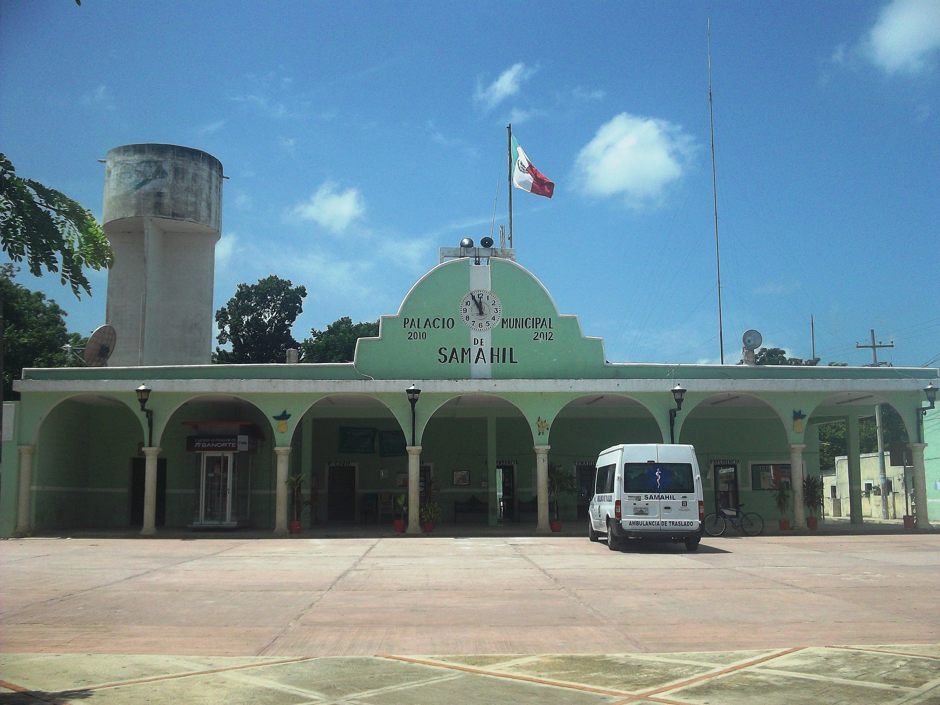 Palacio muncipal de Samahil, Yucatán.